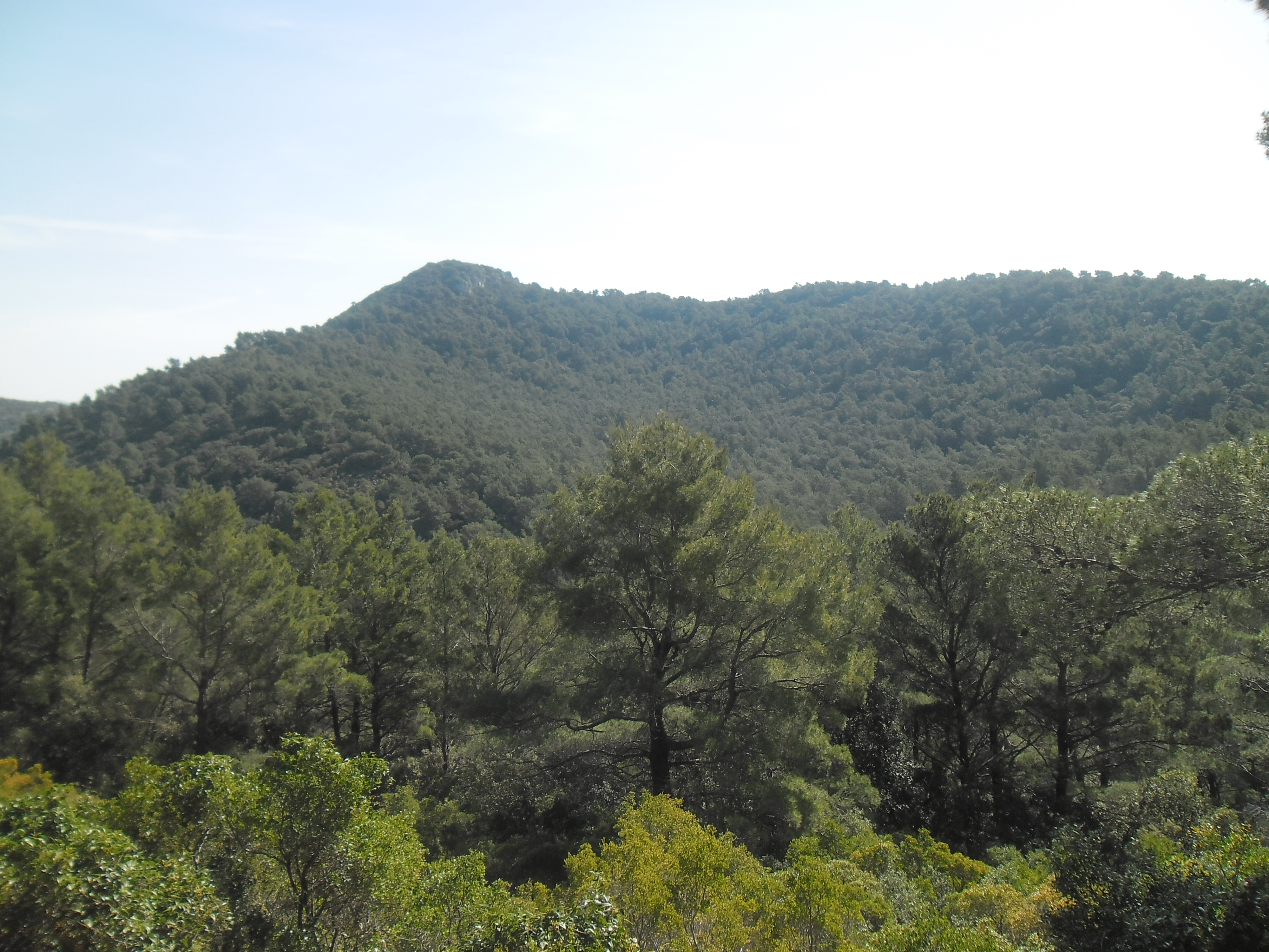 otok Mljet